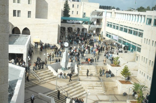 جامعة النجاح الوطنية، نابلس